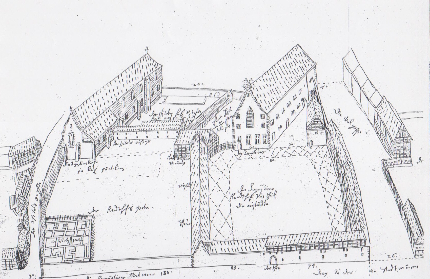 Skizze